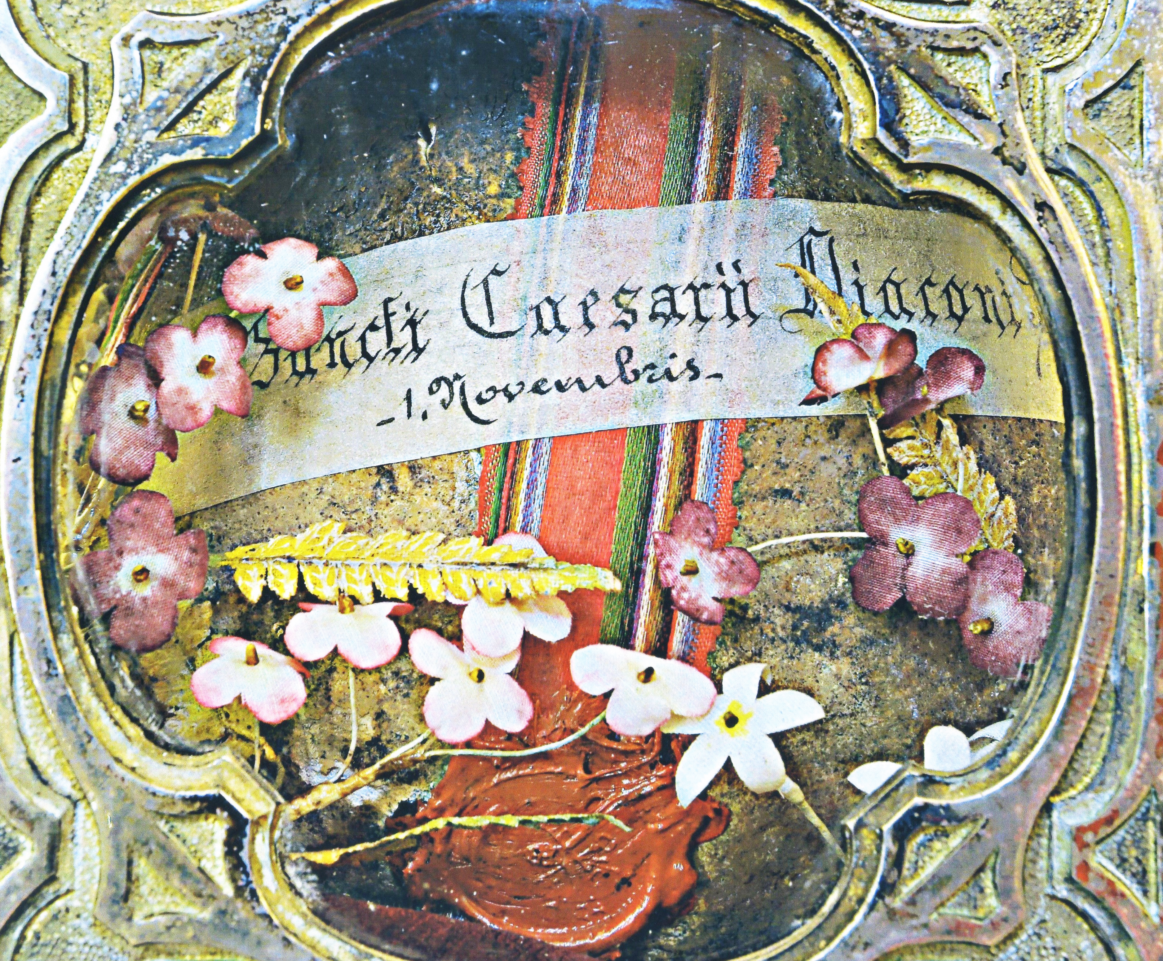 Capo ritenuto di San Cesario diacono e martire, Monastero San Pietro in Modena